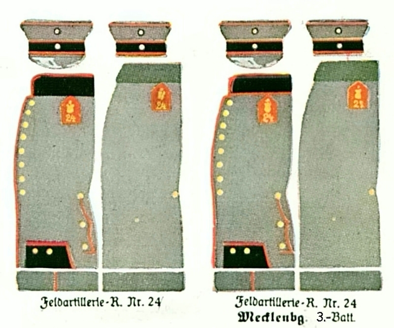 Uniform-Farben des Feldartillerie-Regiment Nr. 24, links 1., 2, 4, 5., 6. Batterie, rechts 3. (Neustrelitzer) Batterie